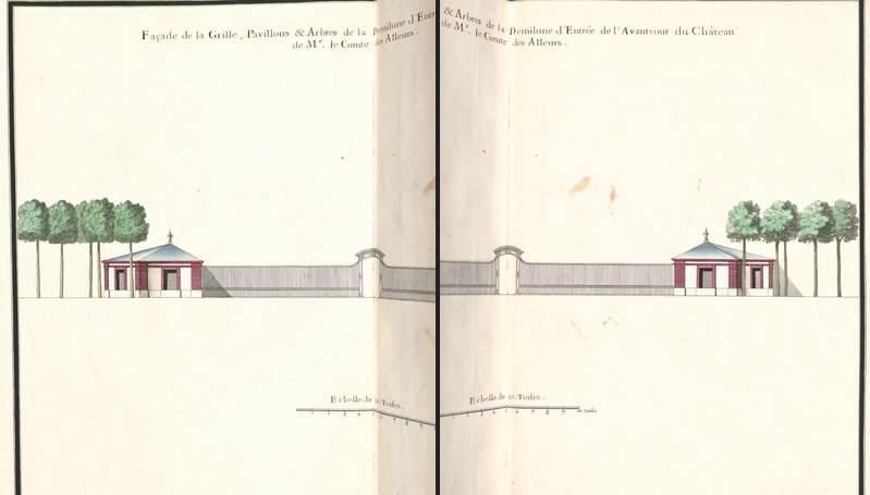 Entrée de l'avant-cour en demi-lune du château de Cherperine d'après les plans de l'architecte Pierre-Alexis Delamair